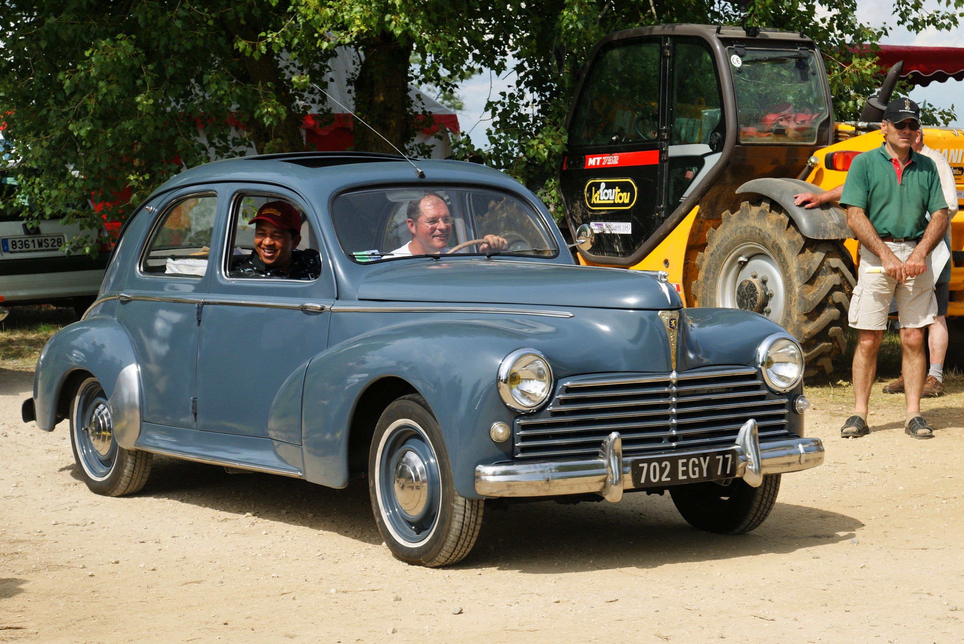 Peugeot 203 participant à la Locomotion en Fête 2009